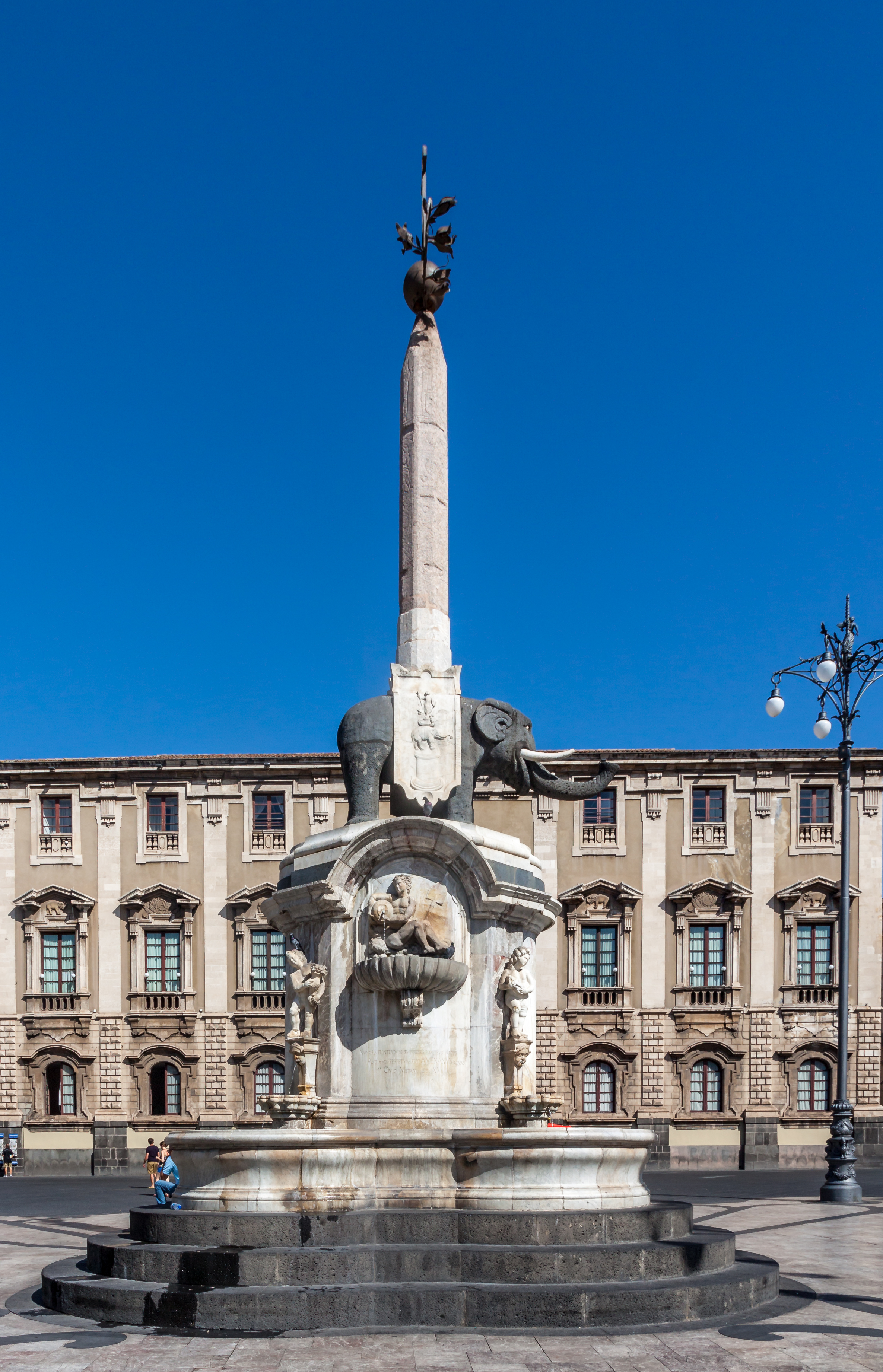 Fontana dell'Elefante, in Piazza del Duomo a Catania